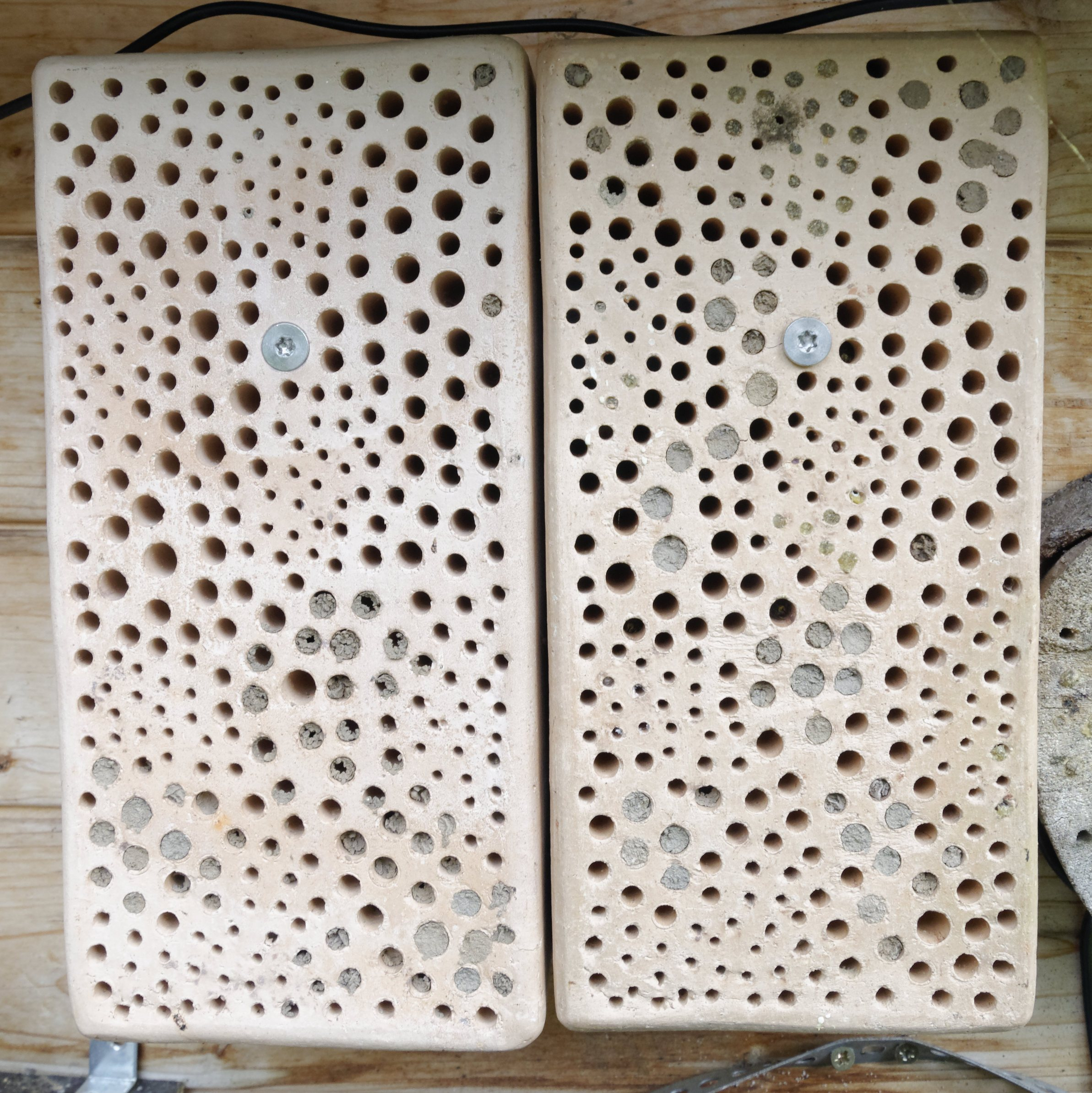 Bienenstein terracotta von von Volker Fockenberg. auch zum Einbau in Fassaden und Mauern 331 Nestgänge Durchmessern von 3 – 8,5 mm 28 verschiedene Hautflüglerarten wurden im Niststeinen nachgewiesen bei ca fünf Brutzellen pro Nestgang, können sich fast 1600 Insekten entwickeln! hochkant oder längs eingebaut oder aufgestellt werden. Zwei Löcher für eine Befestitung Jeder Bienenstein wurde in Handarbeit getöpfert. Der Brand verwendet ausschließlich Energie aus einem eigenen Sonnenkraftwerk! Abmessungen ca.: Höhe 25 cm, Breite 12 cm, Tiefe 7,5 cm; Gewicht ca. 3,9 kg